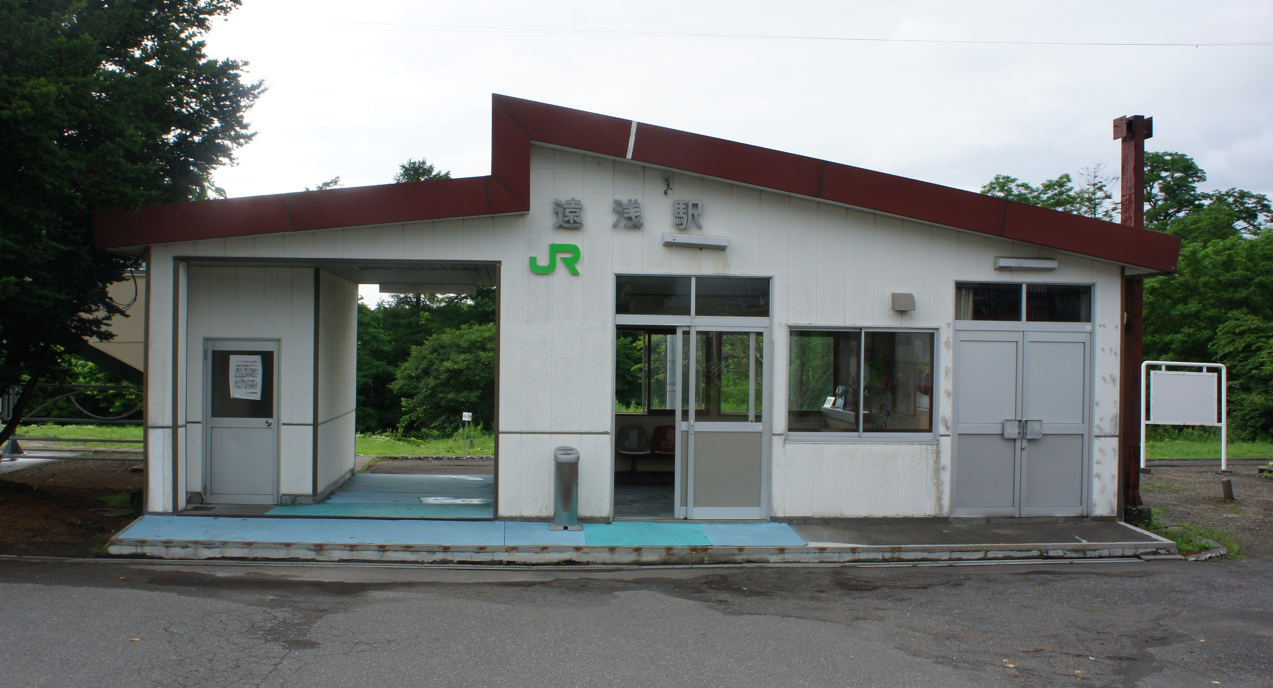 JR室蘭本線・遠浅駅の駅舎